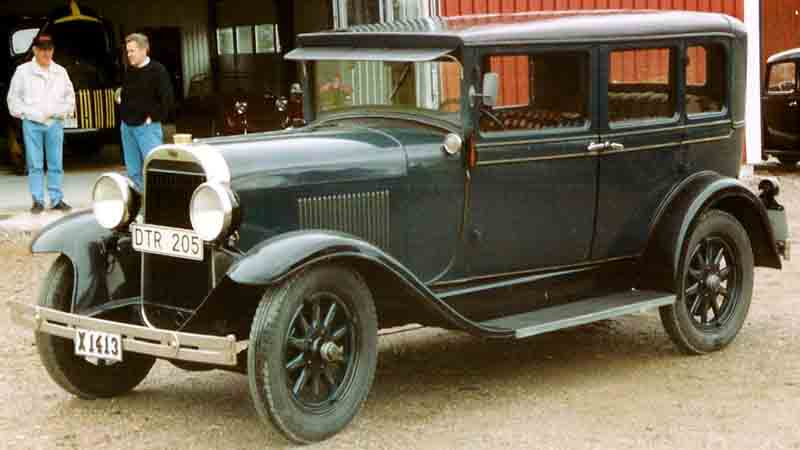 Oldsmobile Model F-28 4-Door Sedan 1928